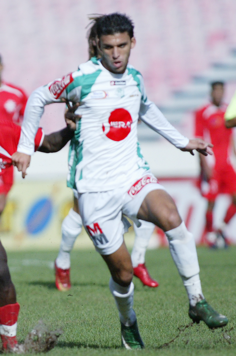 Mohamed Oulhaj, joueur du Raja de Casablanca